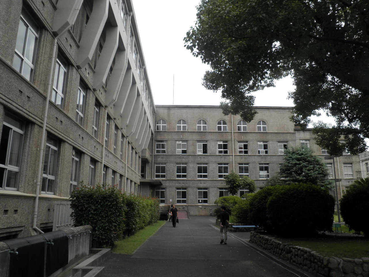 関西大学天六キャンパス